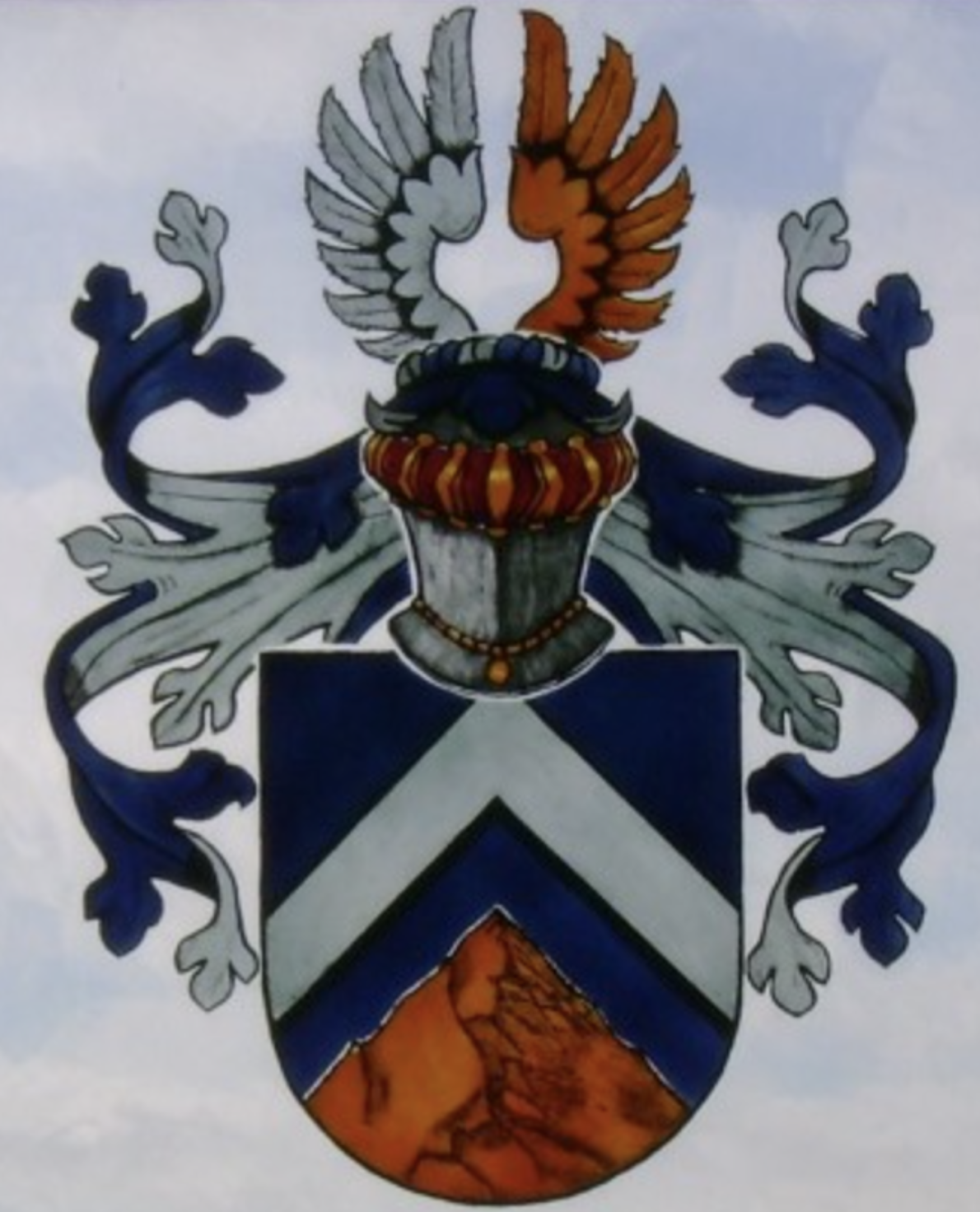 Blason de Famille de La Montagne